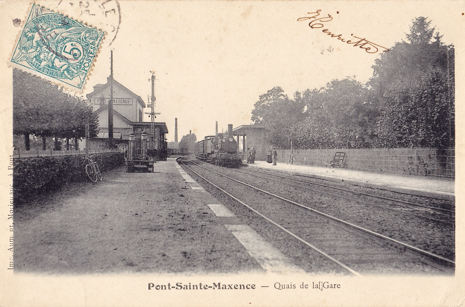 Carte postale ancienne éditée par Aumont : PONT-SAINTE-MAXENCE - Quais de la Gare